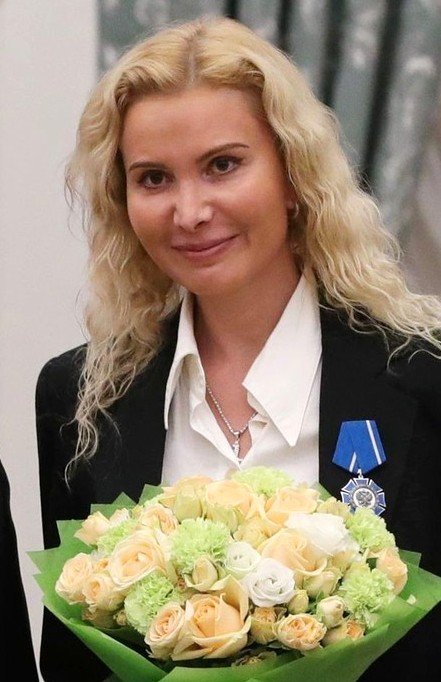 Тренер по фигурному катанию Этери Тутберидзе во время награждения Орденом Почёта